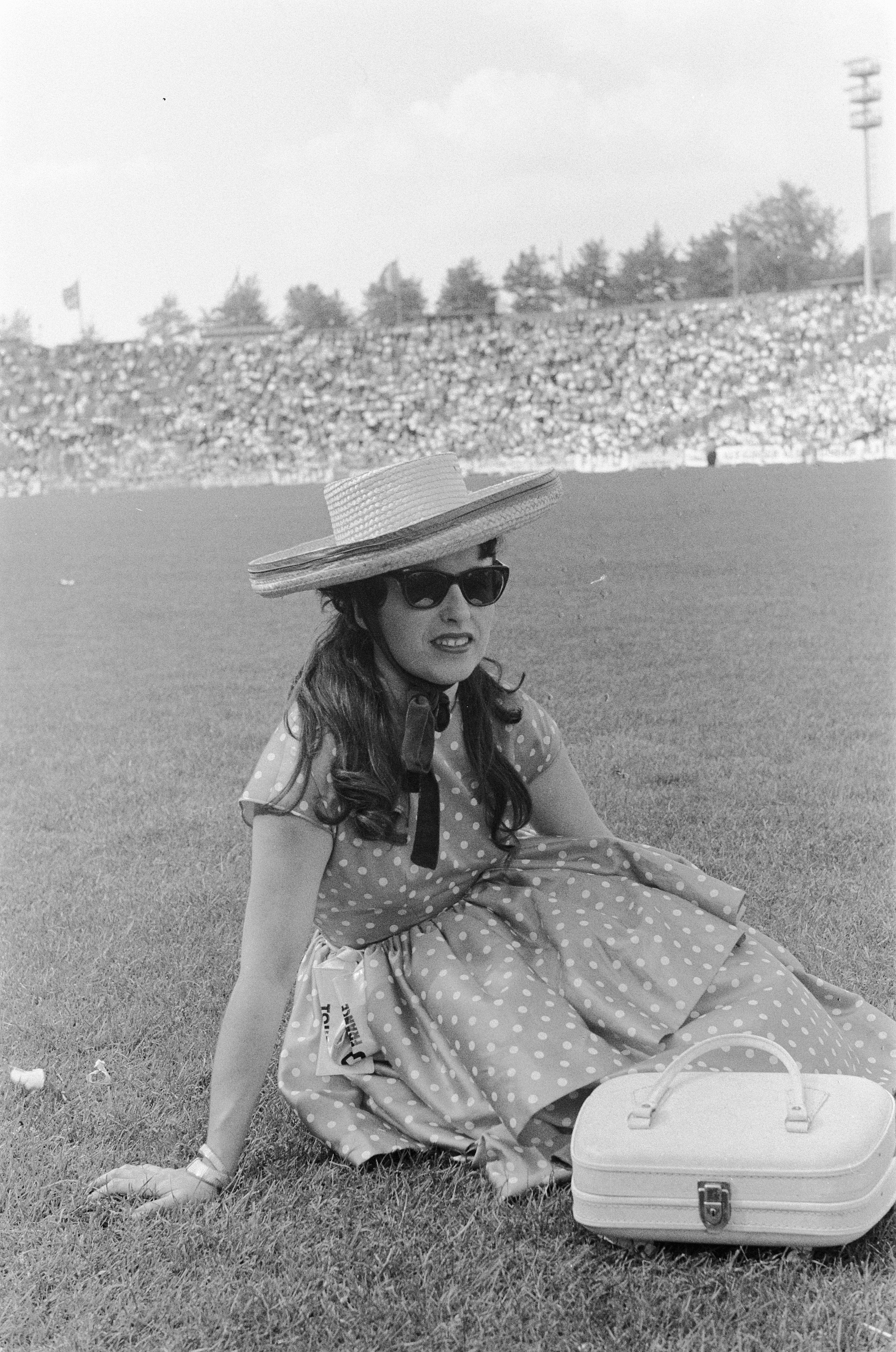 Collectie / Archief : Fotocollectie Anefo Reportage / Serie : [ onbekend ] Beschrijving : Tour de France , Yvette Horner Datum : 28 juni 1960 Locatie : Brussel Trefwoorden : sport, wielrennen Persoonsnaam : Horner, Yvette Instellingsnaam : Tour de France Fotograaf : Pot, Harry / Anefo Auteursrechthebbende : Nationaal Archief Materiaalsoort : Negatief (zwart/wit) Nummer archiefinventaris : bekijk toegang 2.24.01.05 Bestanddeelnummer : 911-3760